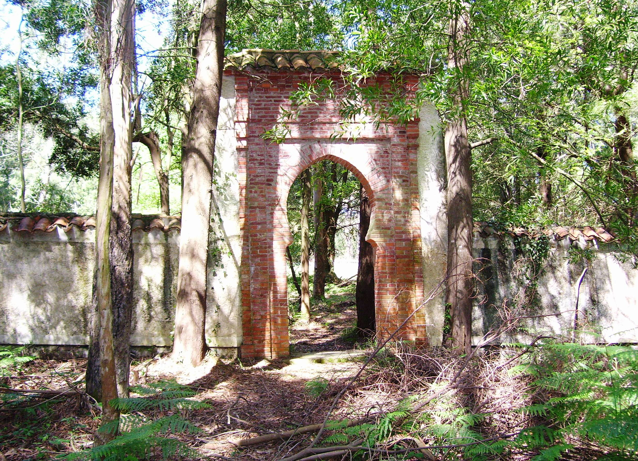 El cementerio "moro" o musulmán de Barcia, en el concejo de Valdés, fue construido en 1936 para enterrar a los soldados regulares de Marruecos que fueron forzados a combatir en el bando de los militares alzados contra la República, durante la Guerra Civil Española. Los marroquíes fueron utilizados como carne de cañón durante la batalla de El Escamplero, en la ofensiva a Oviedo. No hay cifras exactas del número de musulmanes que fueron enterrados en él; aunque algunas fuentes hablan de unas 300 tumbas. El cementerio tiene cerca de 4.000 metros.